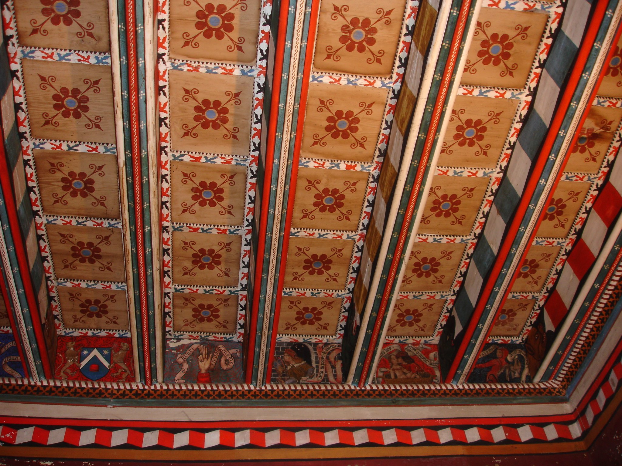 Abbaye de Saint-Hilaire, Aude (11), plafond du logis abbatiale